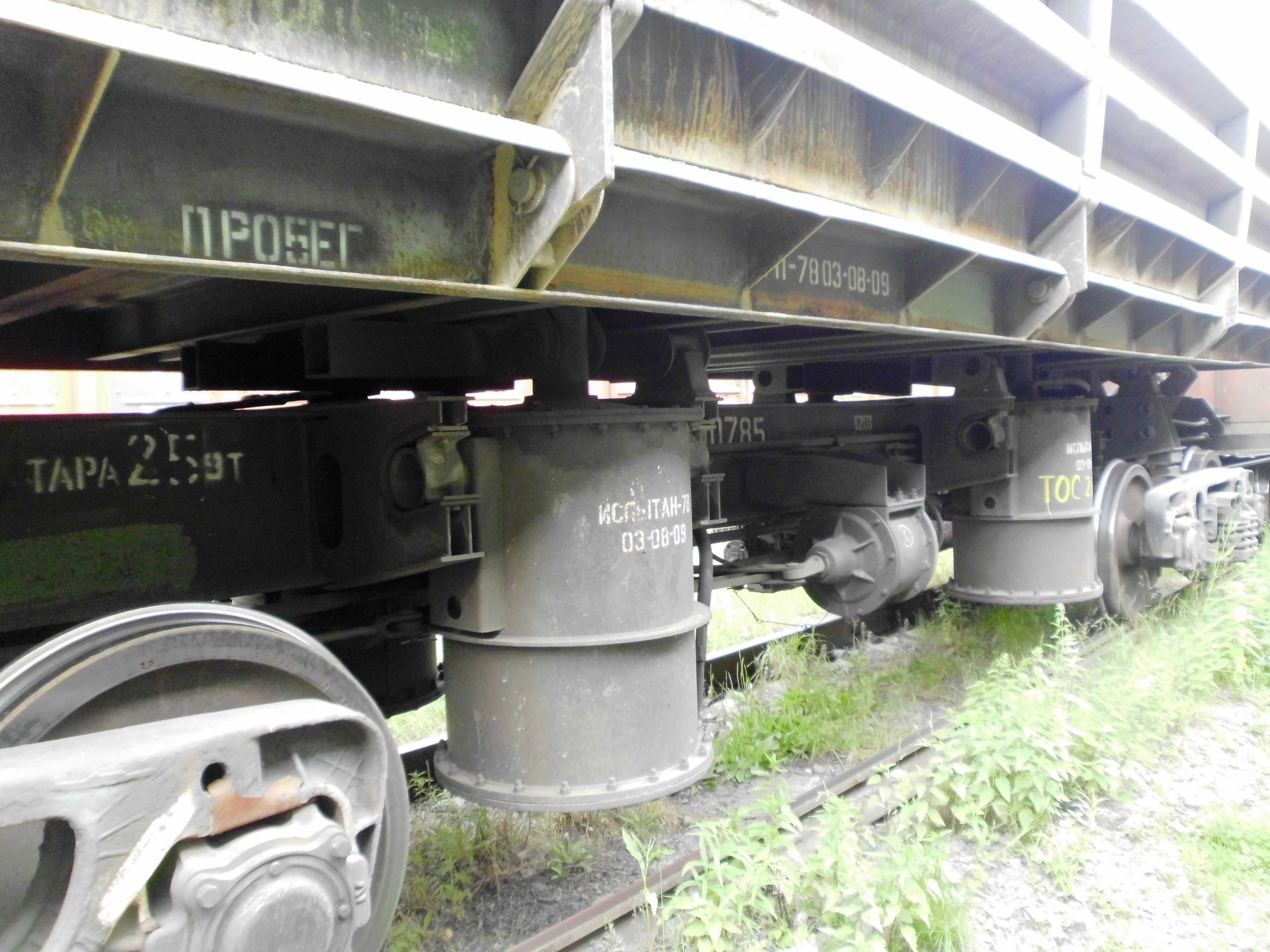 Думкар. Пневмоцилиндры опрокидывания кузова.